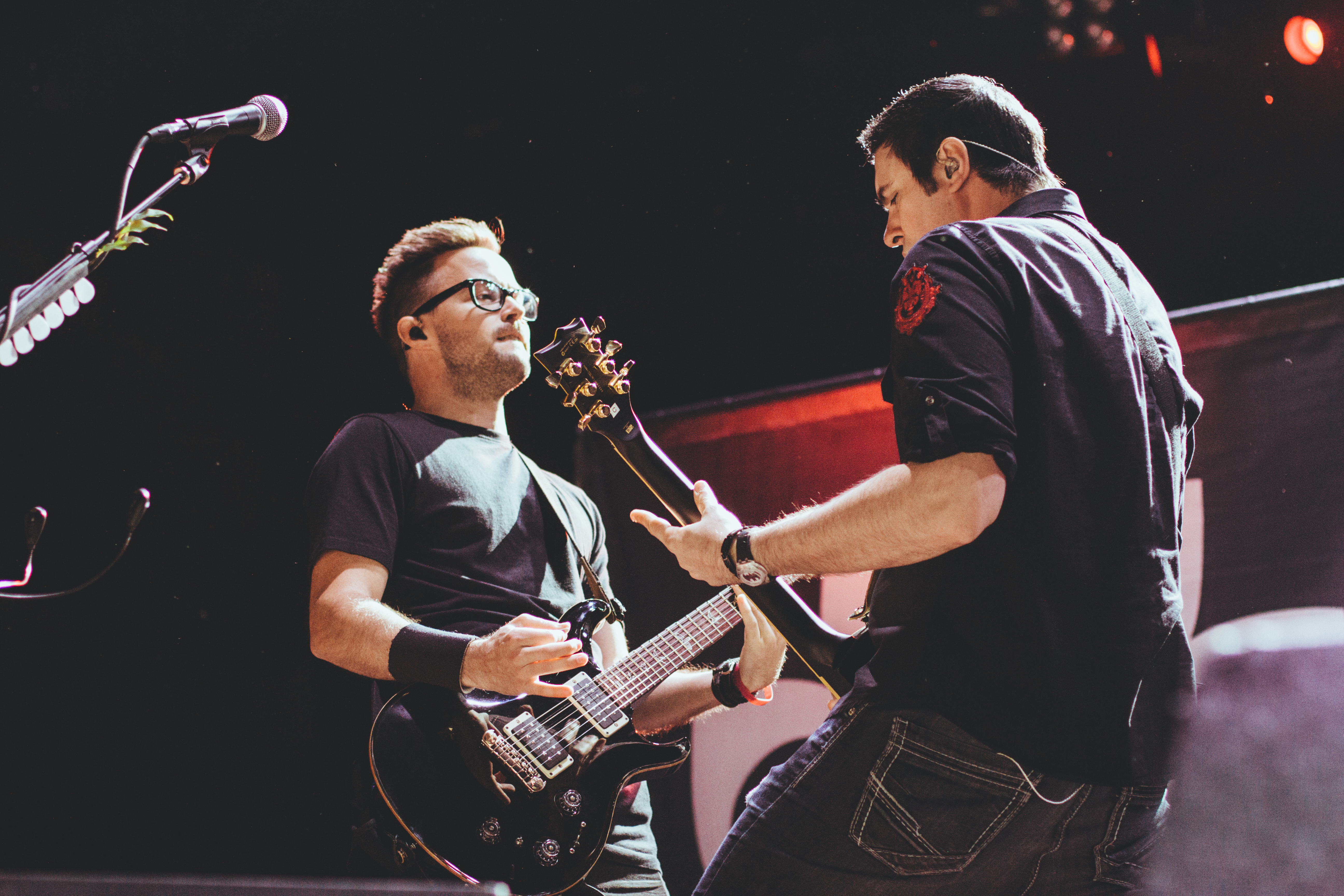 Breaking_Benjamin-3469